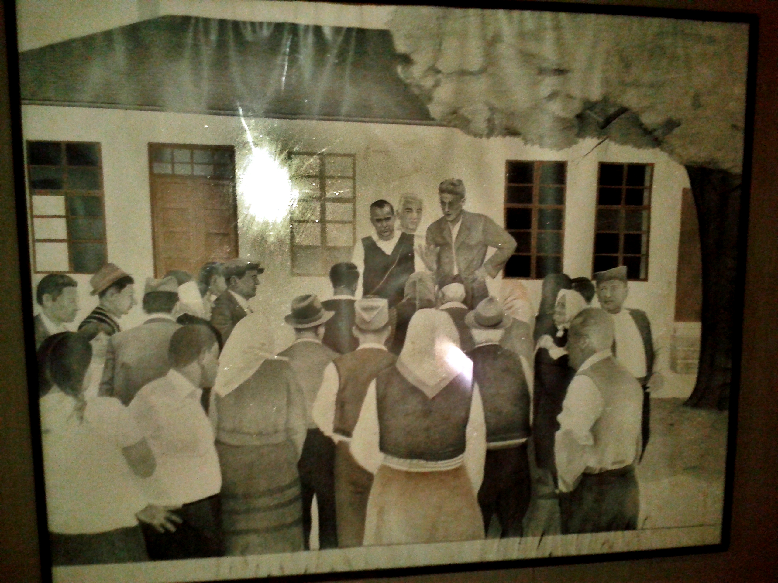 Слика Милана Блануше "Народни збор у Белој Цркви 7. јула 1941." у сталној поставци Музеја 7. јули 1941. у Белој Црви, код Крупња.